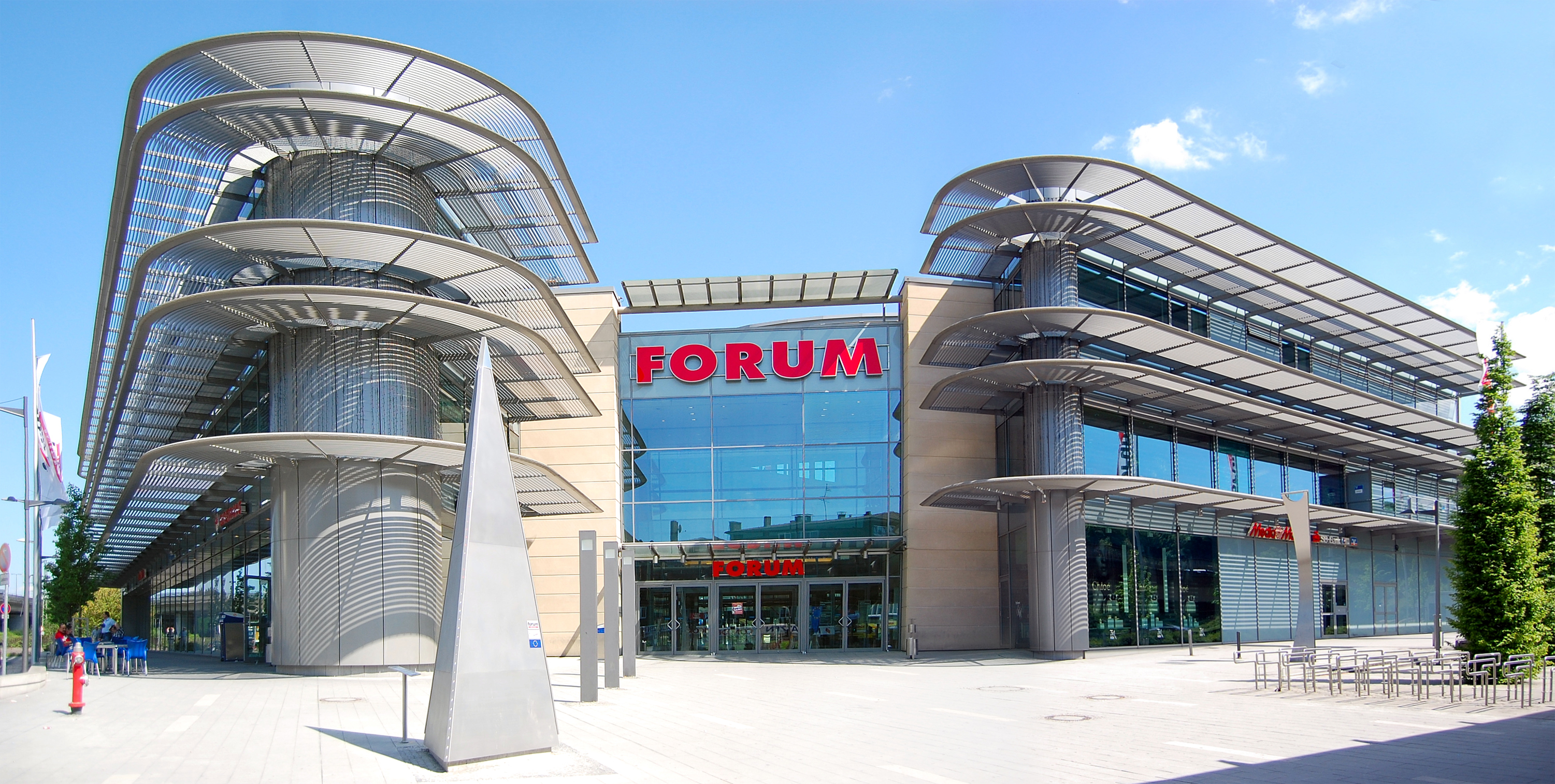 Forum Wetzlar Frontansicht